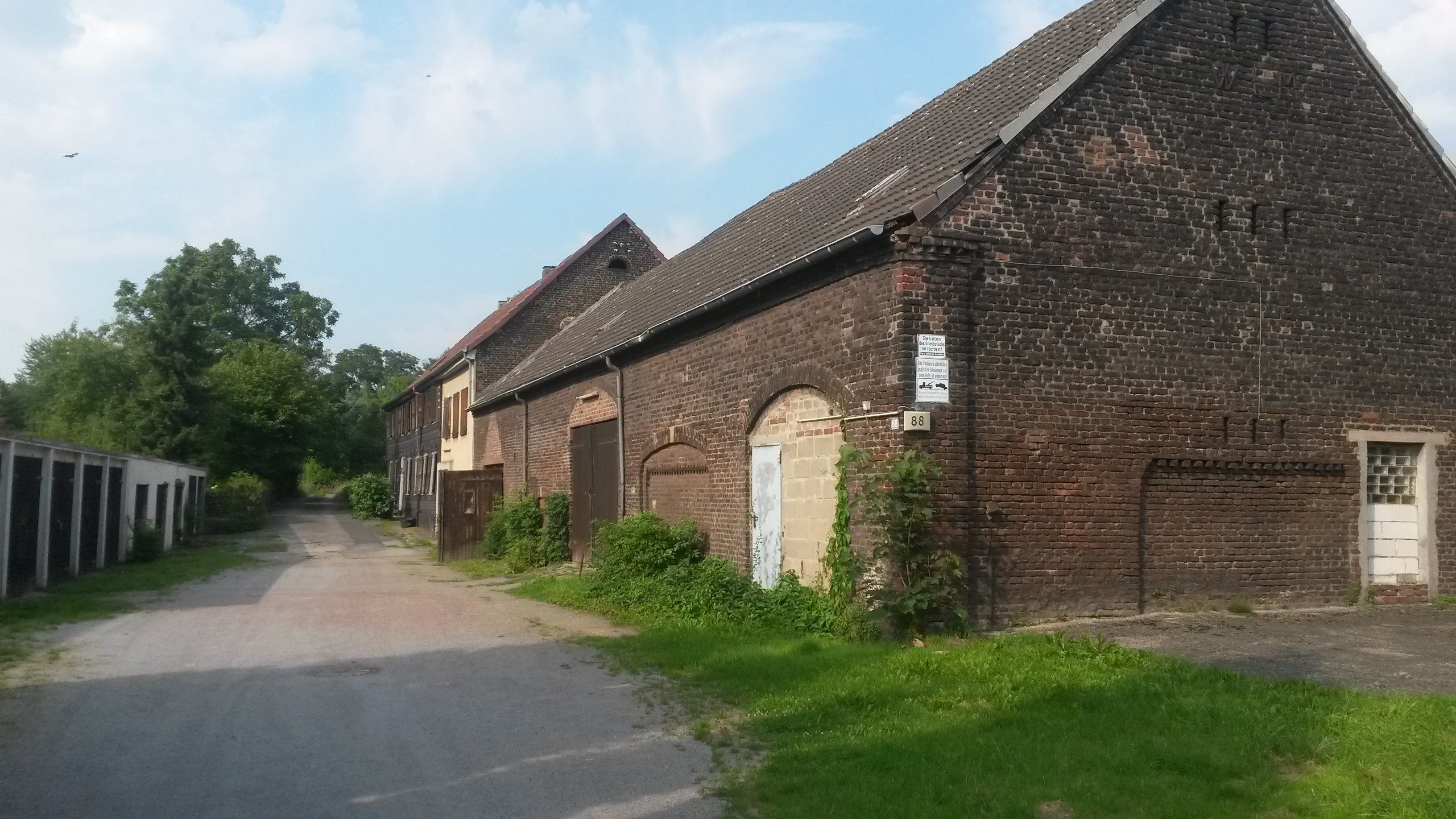 Der Lindermannshof in Alstaden (Oberhausen)